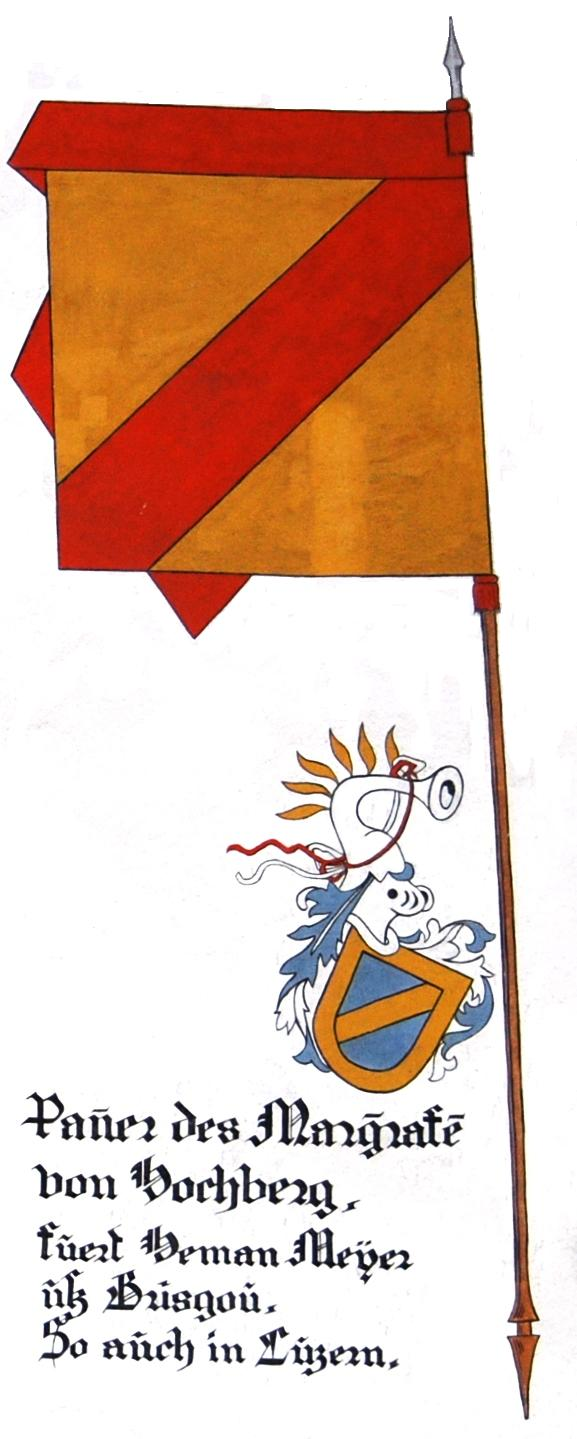 Wappen des Hachbergschen Bannerträger Henmann Meyer-Niessen